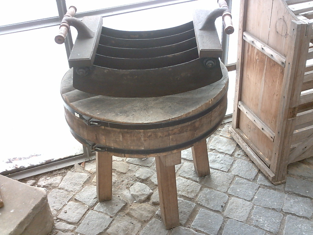 Großes Wiegemesser, selbst fotografiert, März 2006